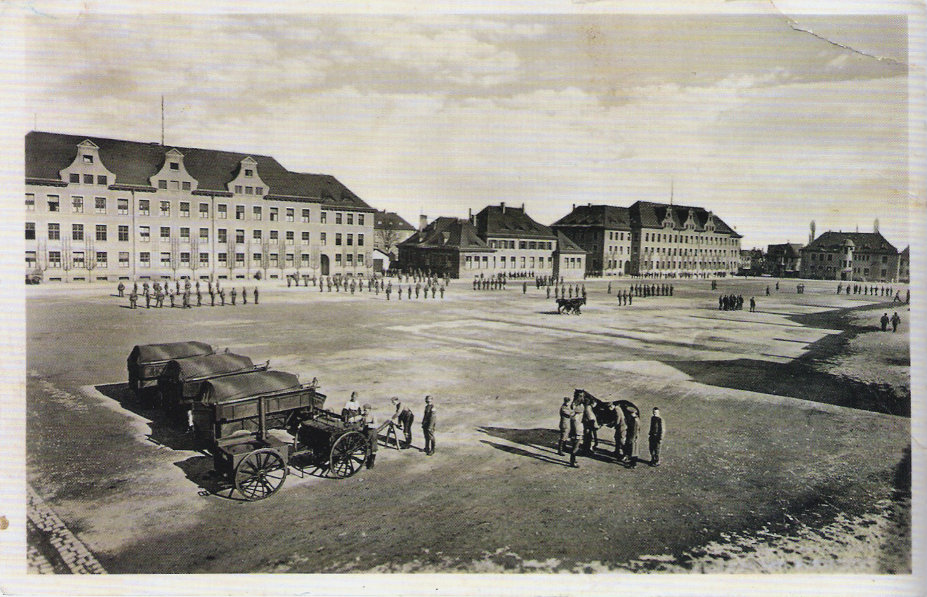 Die „Neue Kaserne“ nach der offiziellen Umbenennung in Loretto-Kaserne (Oktober 1938). Diese Bezeichnung trägt die Kaserne bereits auf der Rückseite der Ansichtskarte. Blick vom Südwesten nach Nordosten. (Fotoansichtskarte)